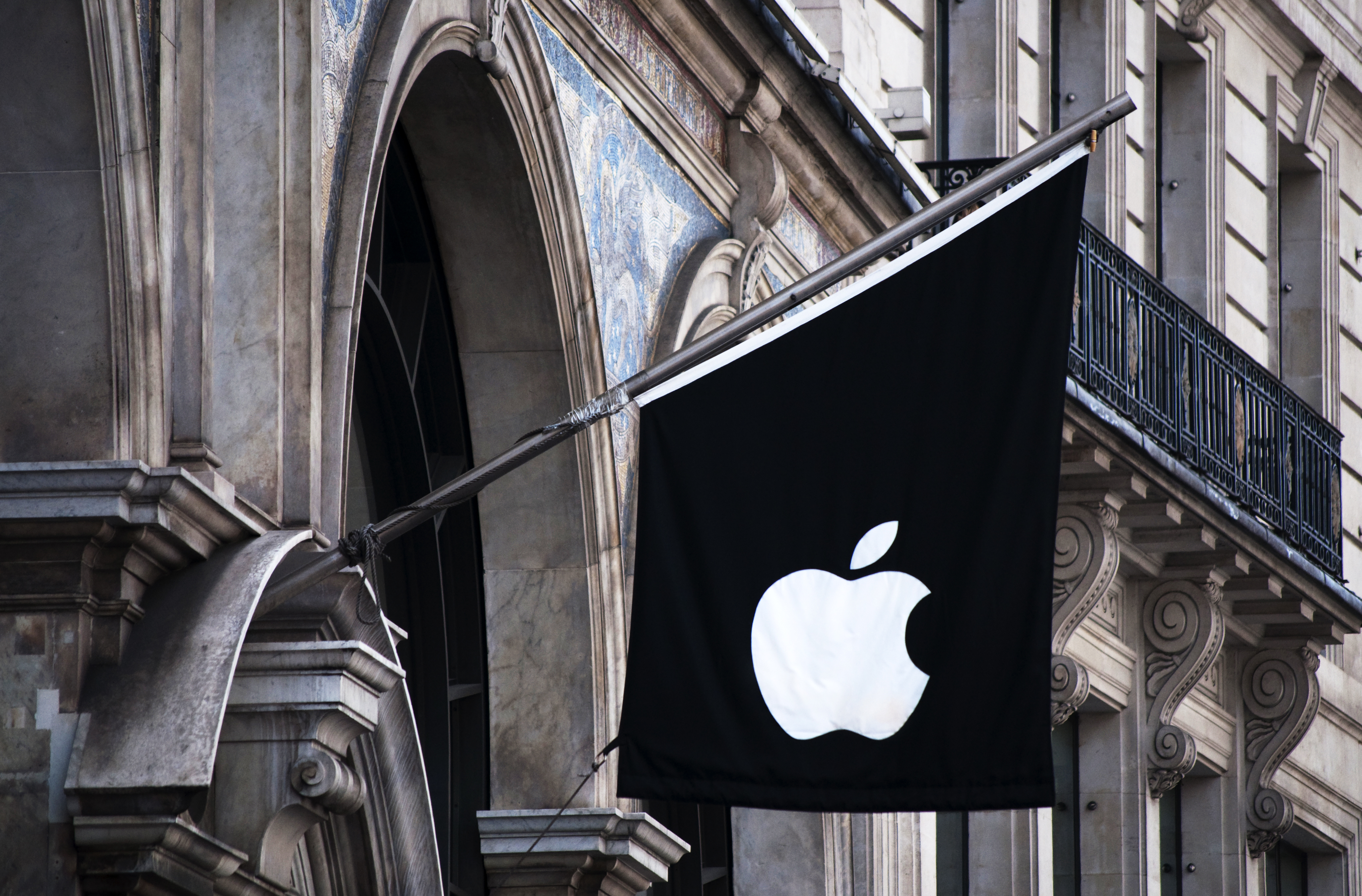 apple, flag, regent street, apple store, London